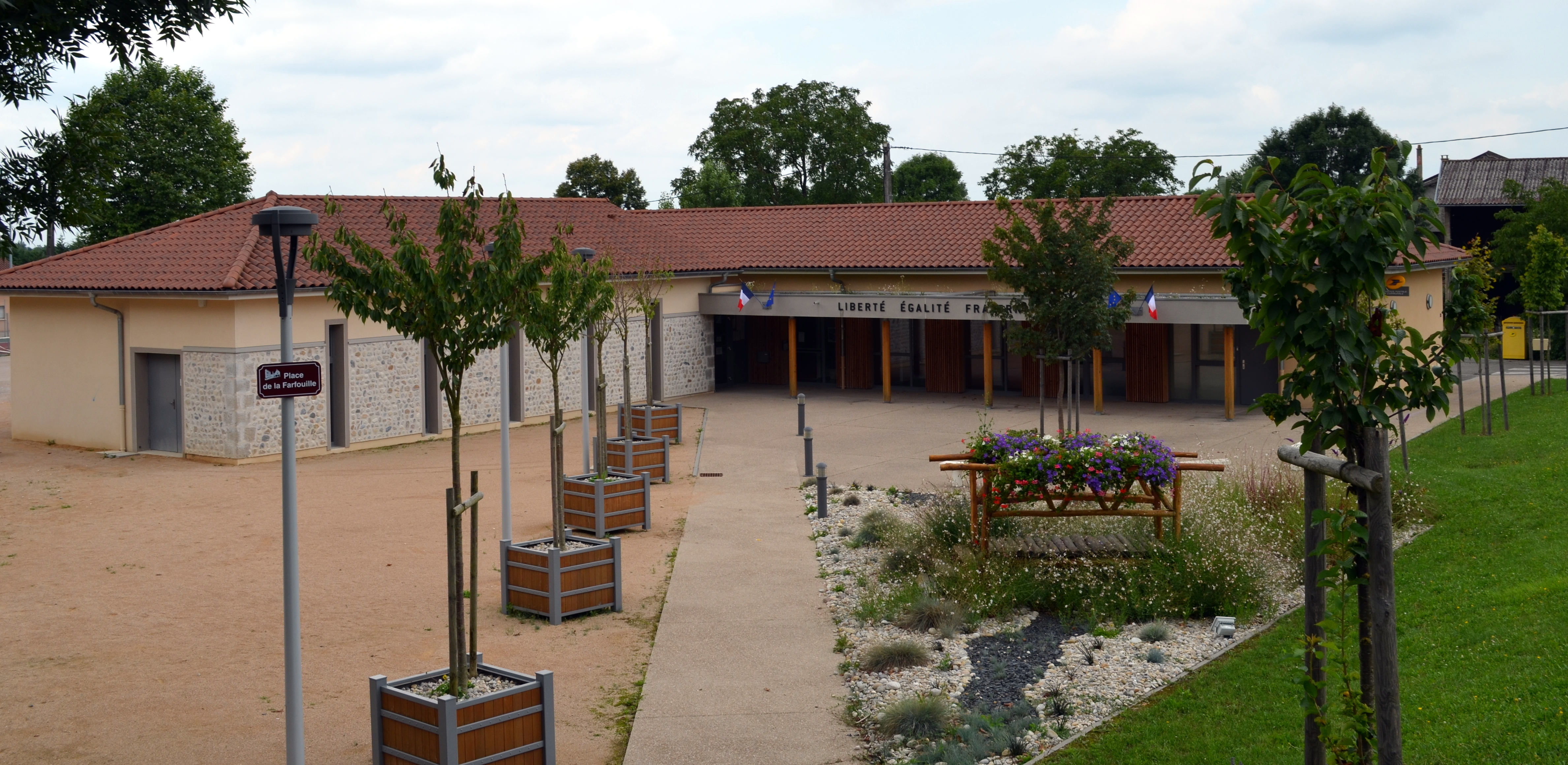 Mairie de Leyment.